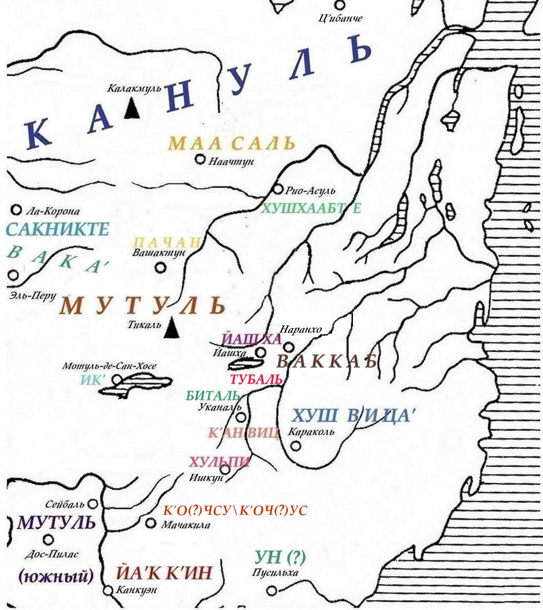 Mutal Map